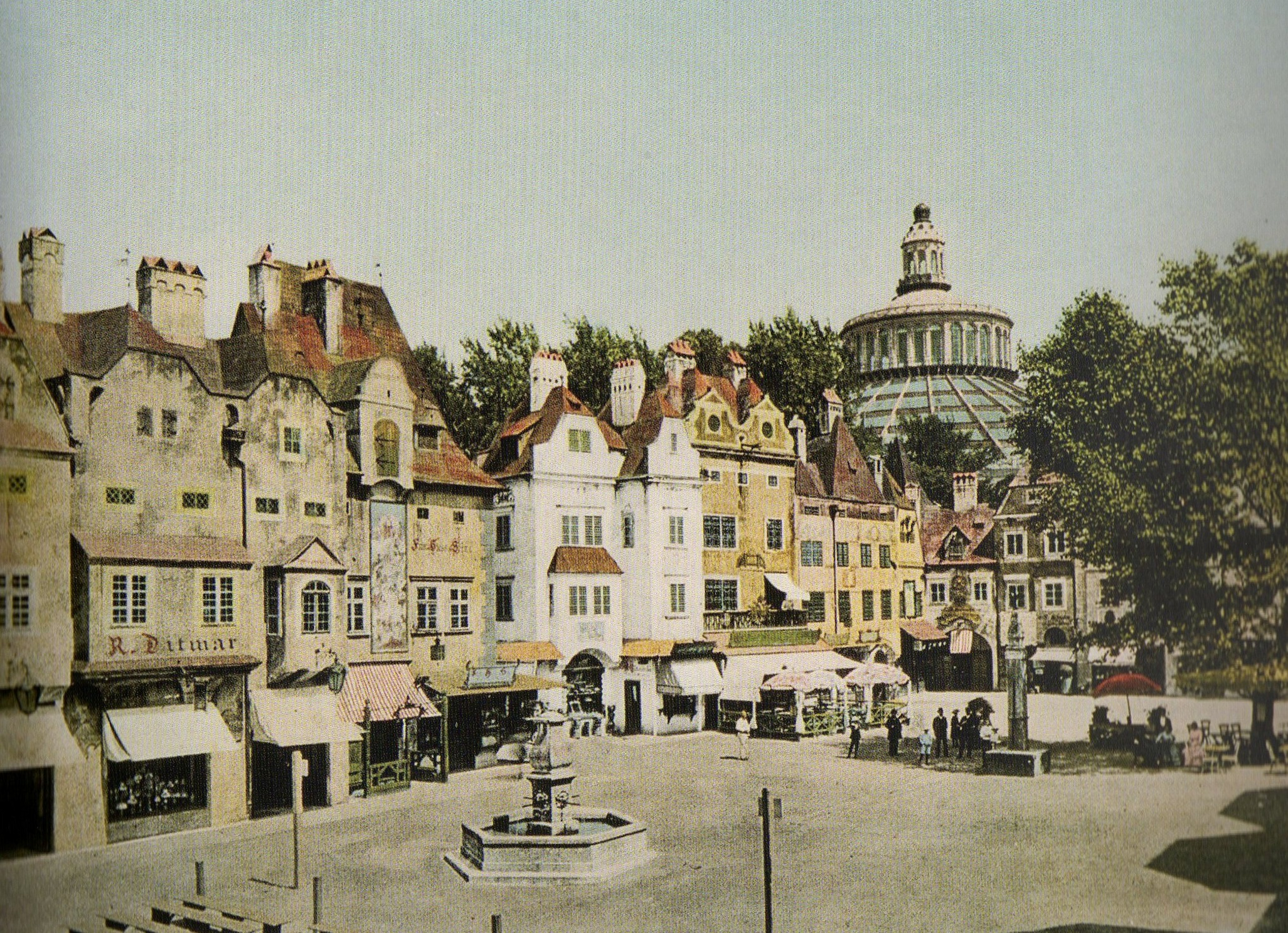 Wien, Theaterausstellung 1892. Rekonstruktion des Hohen Marktes